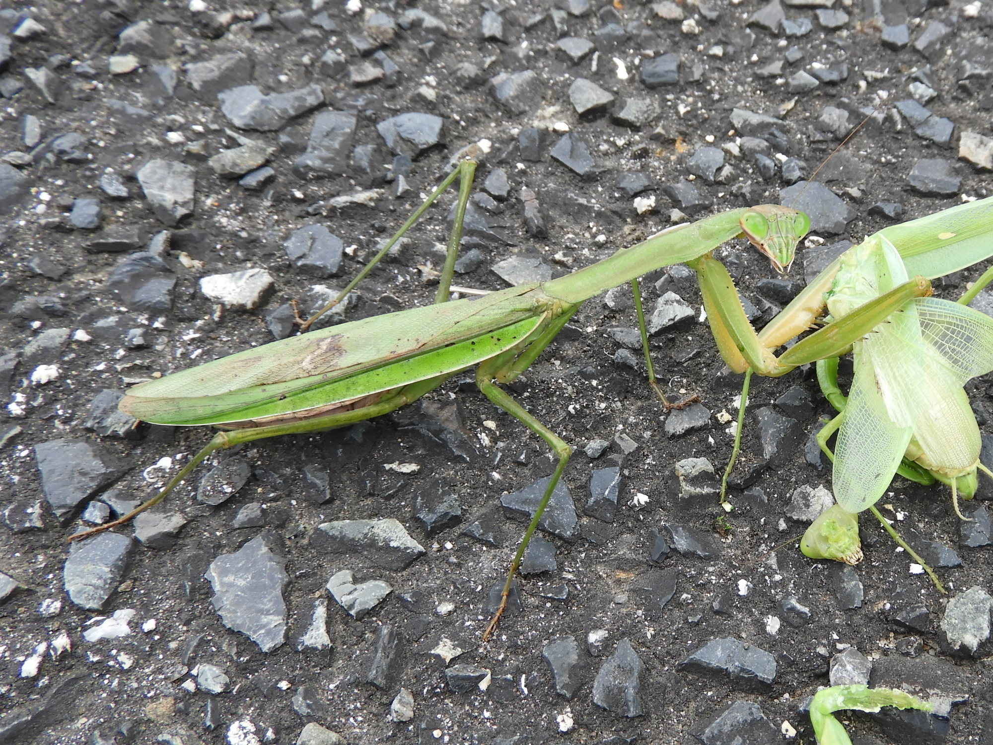 オオカマキリ雌＆ハラビロカマキリ雌 広島県